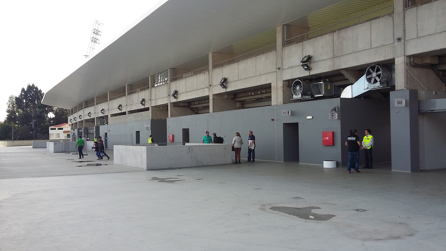 Terraço nascente do Estádio dos Barreiros - Remodelação 2016